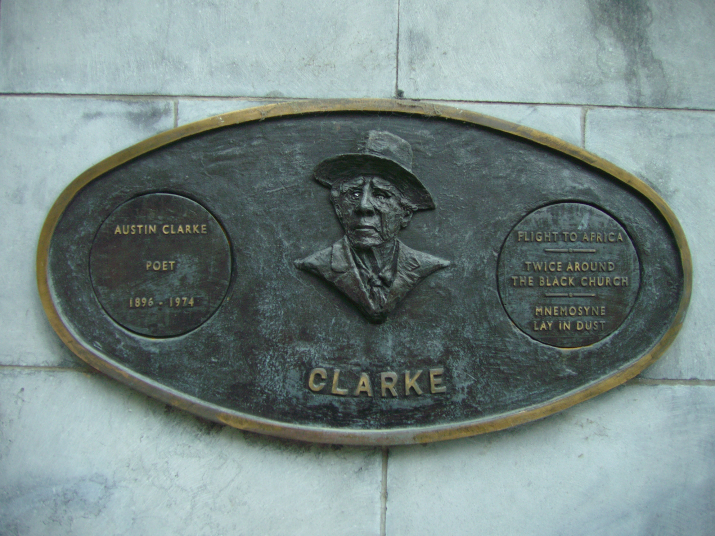 Austin Clarke (1896–1974), irischer Dichter; Plakette im Saint Patrick's Park, Dublin, dort angebracht anlässlich der Dublin Millennium 988–1988 Literary Parade